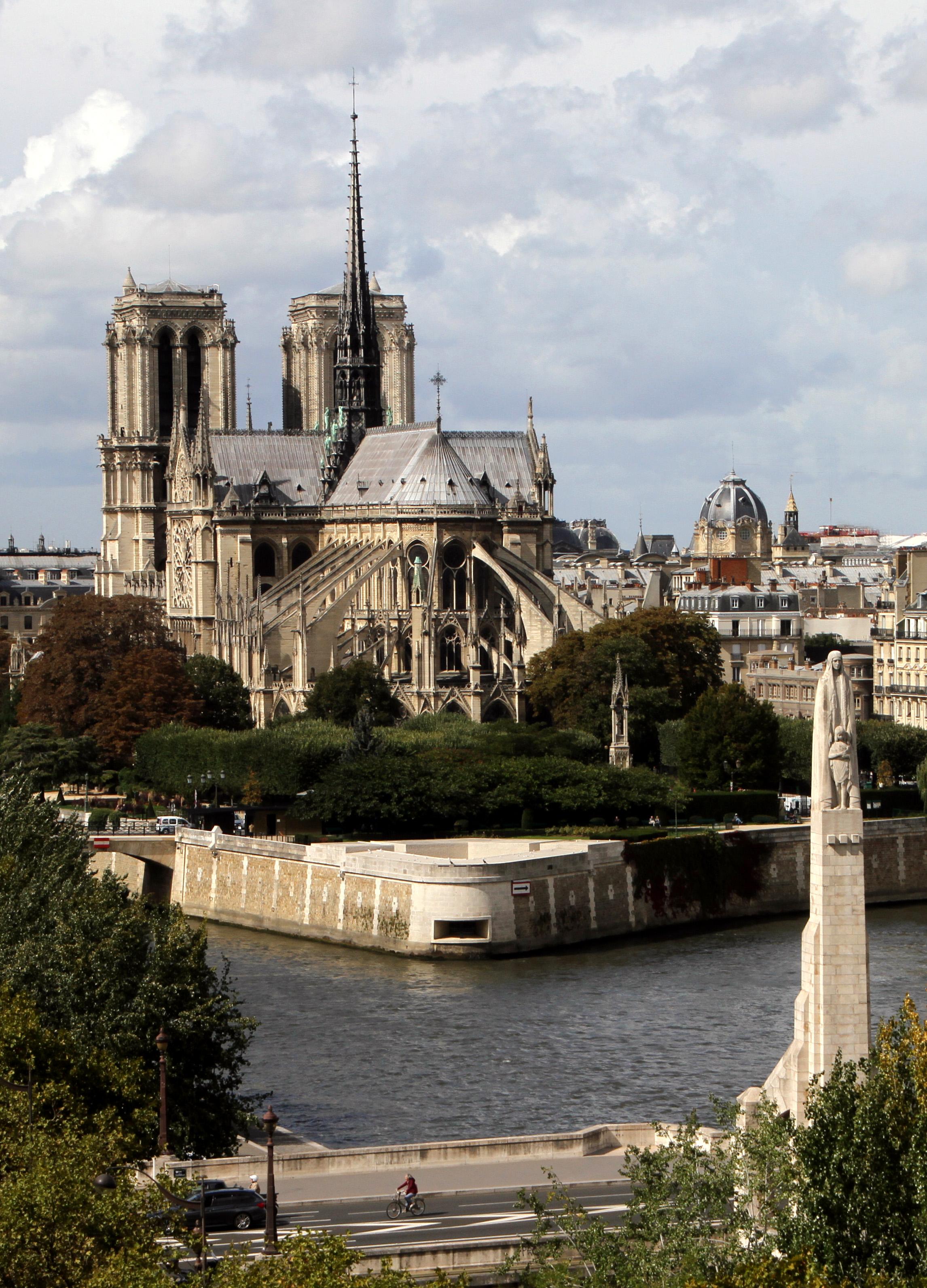 Paris Notre Dame vom Institut du monde arabe 2017